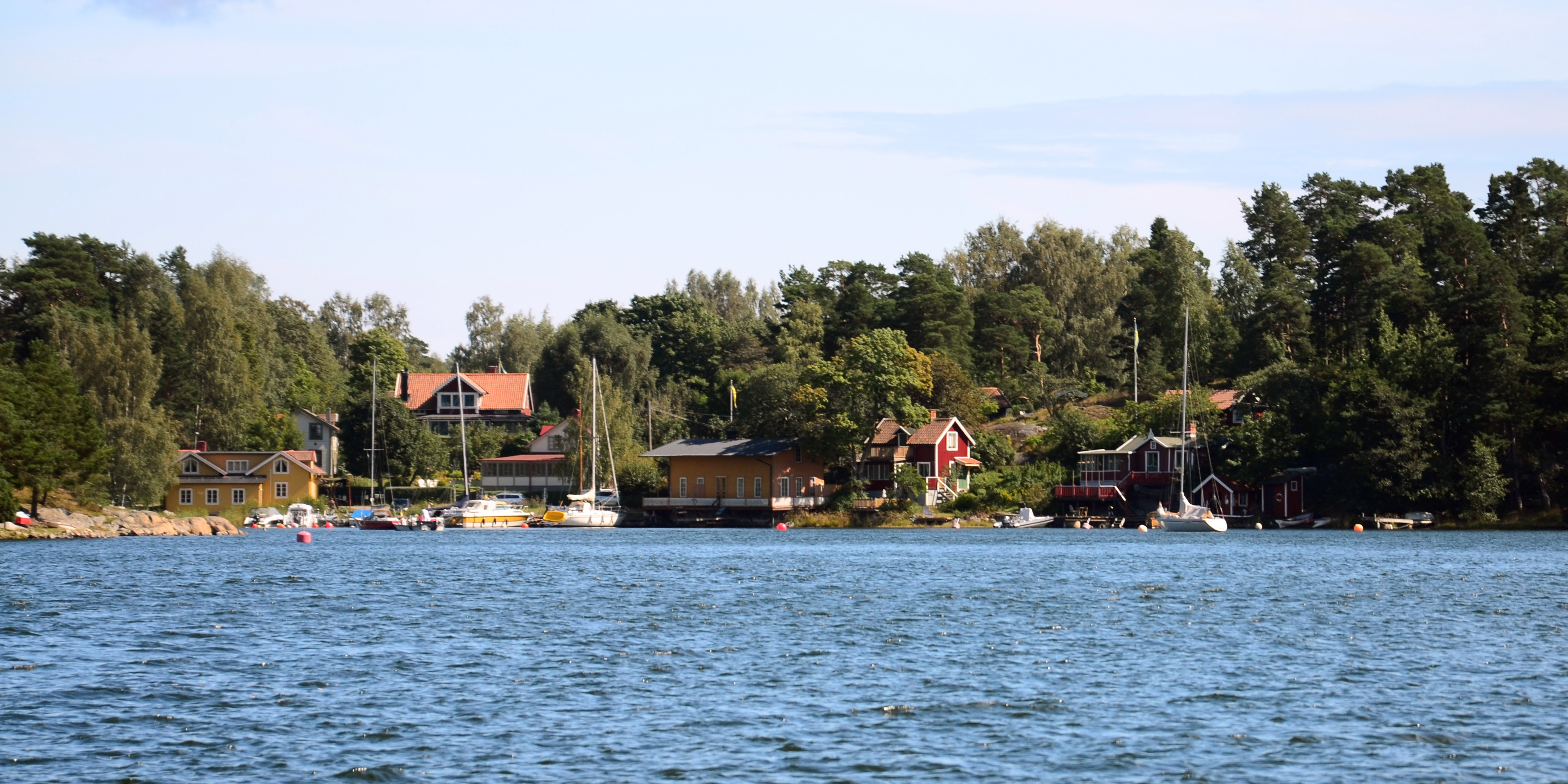 Byviken vid Stavsnäs. Ej att förväxla med Stavsnäs vinterhamn på andra sidan udden, en dryg kilometer åt sydost.